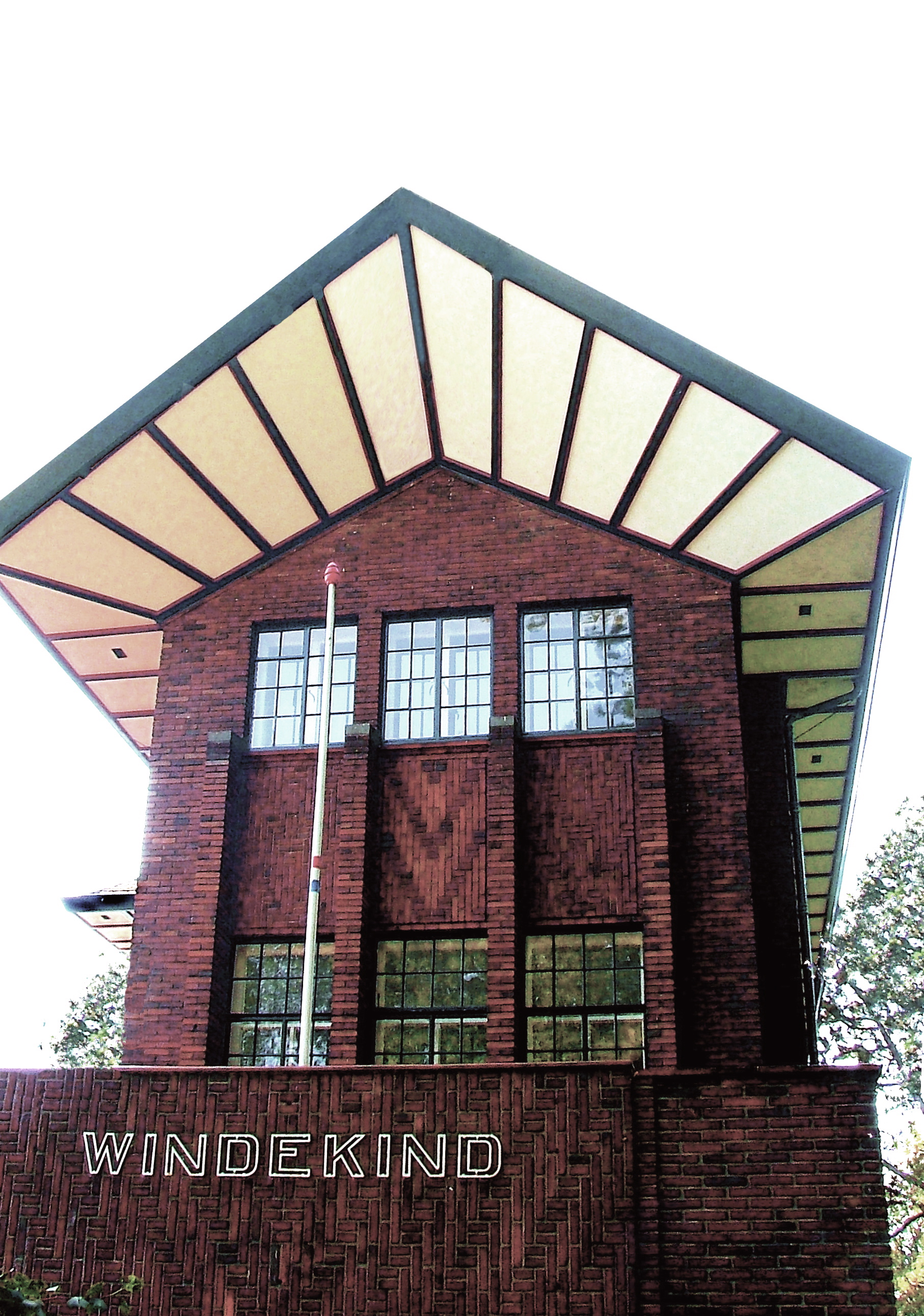 Den Haag Vrijstaande villa uit 1927-1928, gebouwd in opdracht van Francois van 't Sant naar ontwerp van architect D. Roosenburg Met ingang van 25 oktober 1920 werd Van 't Sant hoofdcommissaris in Den Haag als opvolger van H.J. Versteeg. Hij kreeg toen onder meer te maken met een dossier over financiële verplichtingen die Hendrik van Mecklenburg-Schwerin, de echtgenoot van Koningin Wilhelmina, was aangegaan in verband met buitenechtelijke kinderen. Inzake de door Hendrik verwekte zoon die door het leven ging als Pim Lier, halveerde Van 't Sant de maandelijkse toelage van duizend gulden. In zijn eigen woning arrangeerde hij voor Hendrik ontmoetingen met prostituees, zodat hij over Hendriks seksuele escapades enig overzicht behield. Van 't Sant raakte in de jaren dertig in opspraak door de affaire 'Elisabeth le Roi'. De exacte toedracht is nooit duidelijk geworden. Vermoedelijk had van 't Sant de dame van deze naam zelf verzonnen om de nabestaanden van de Nederlandse gezant te Brussel te chanteren met een buitenechtelijk kind. De familie betaalde, en Van 't Sant bouwde een kapitale villa .(Windekind) (1942) bevond zich in villa Windekind de Nederlandse vestiging van 'Referat IVB4' van het 'Reichssicherheitshauptamt', de Duitse instantie die verantwoordelijk was voor de deportatie van de Joden. Hier vonden o.a.ook de beruchte verhoren plaats van in het 'Oranjehotel' gedetineerde politieke gevangenen.(Zaak Weinreb ea)